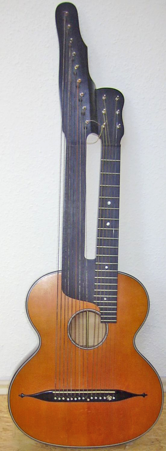 Schrammel-Bassgittar